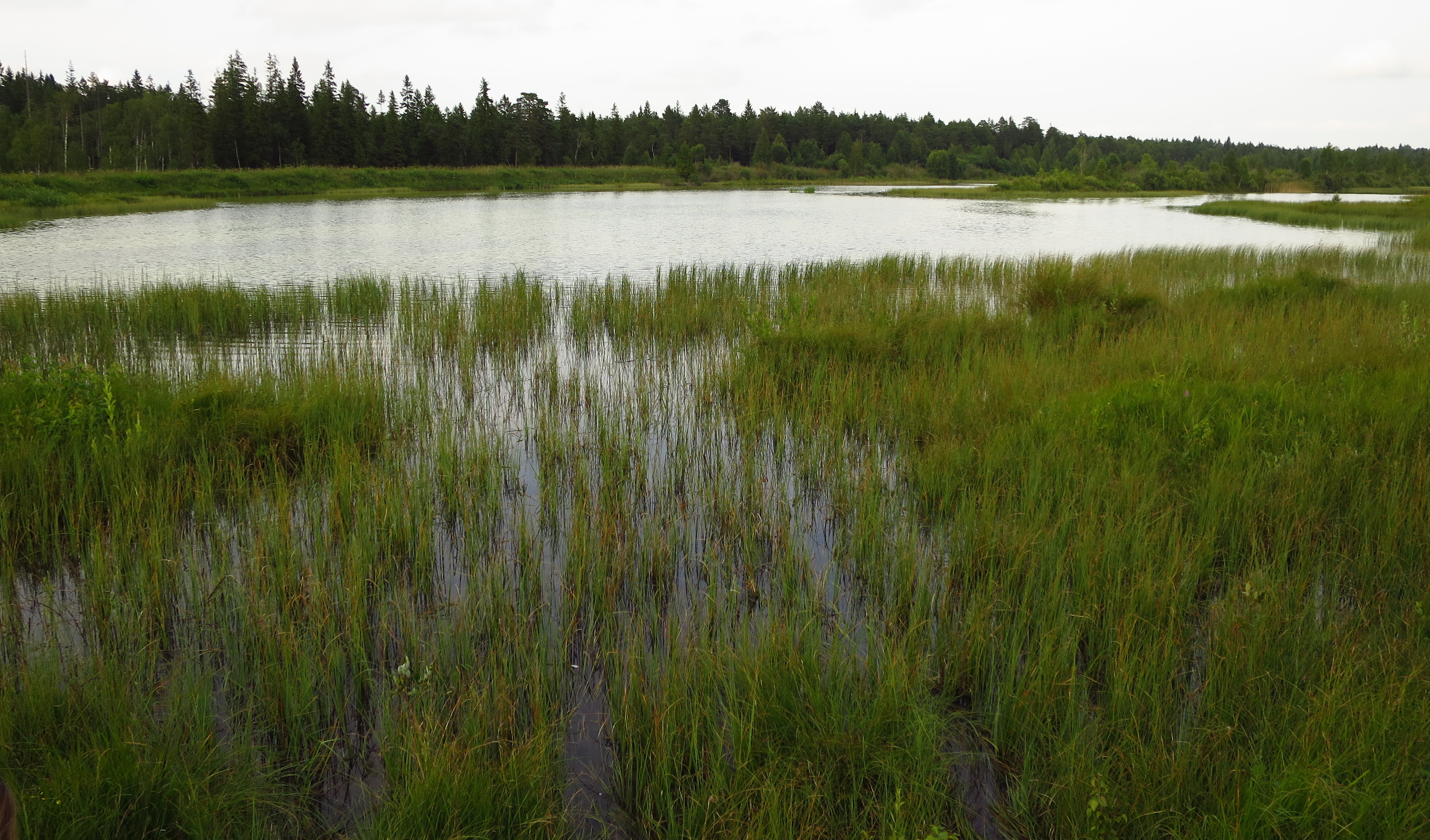 Varangu järv Varangu LKA-l